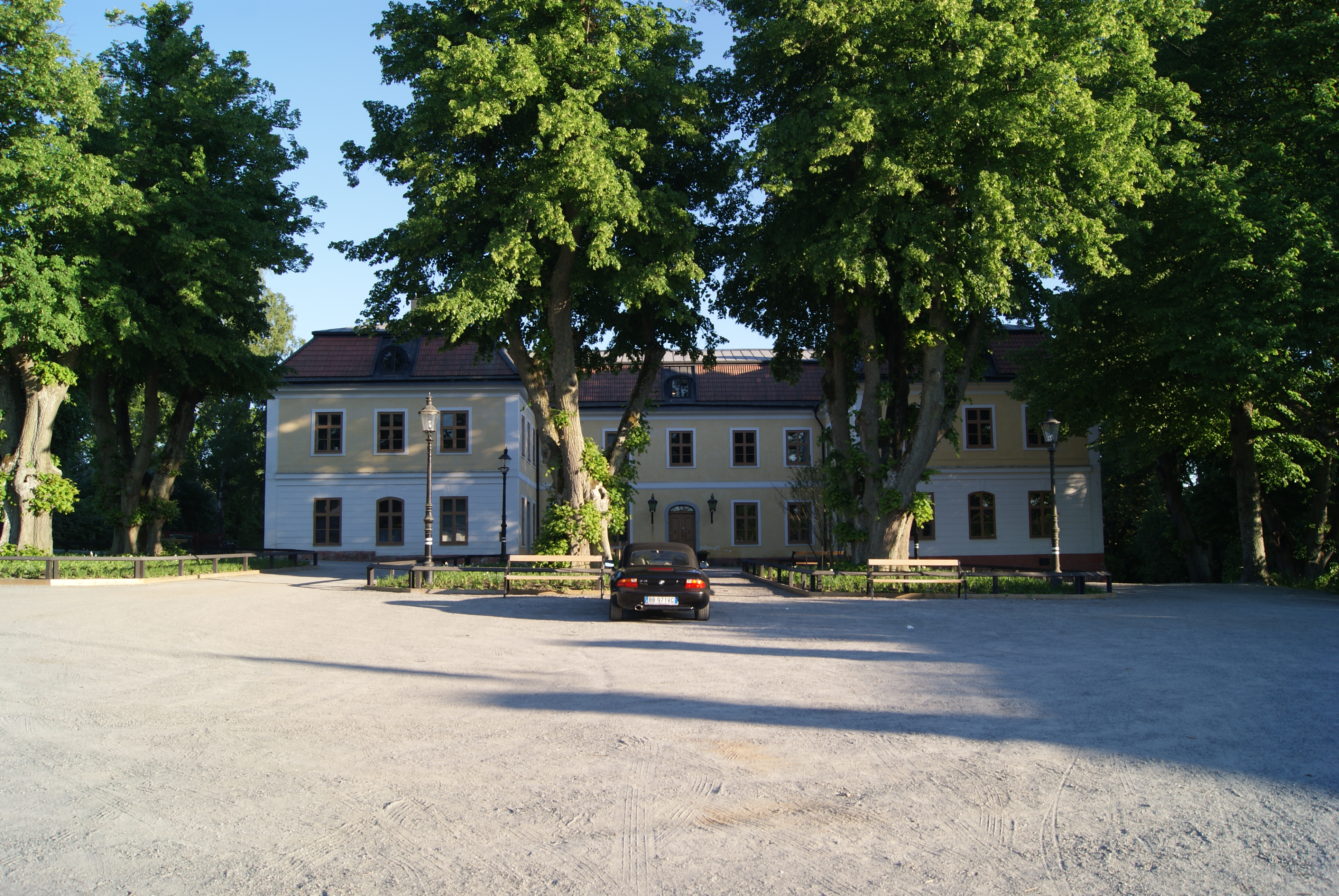 Edsberg Schloss, Sollentuna in Schweden 2018 Vorderseite (Nordseite)